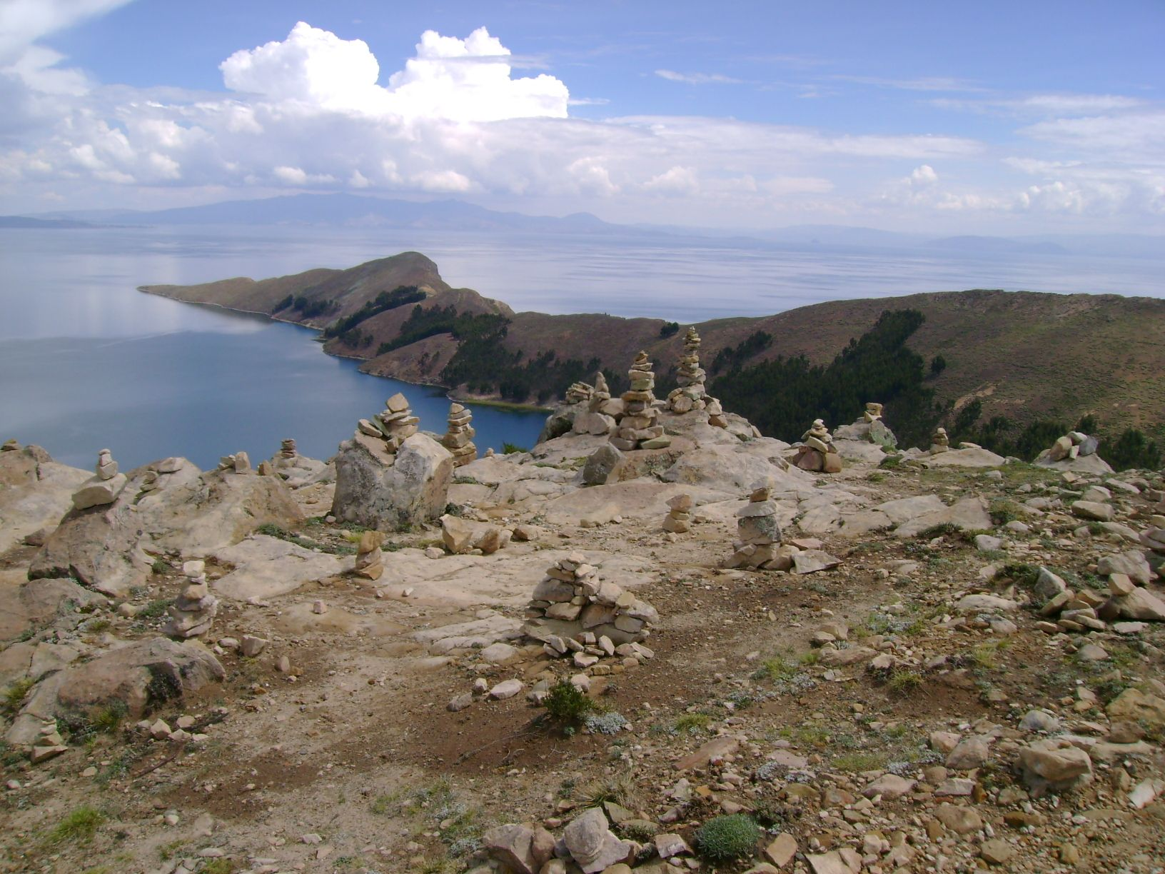 Foto tirada por mim, na Isla del Sol.